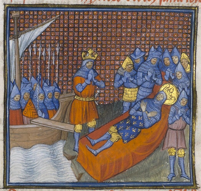 « Mort de Saint Louis à Tunis » [1270], enluminure illustrant un manuscrit des Grandes Chroniques de France,xive siècle. Musée Condé, Chantilly.